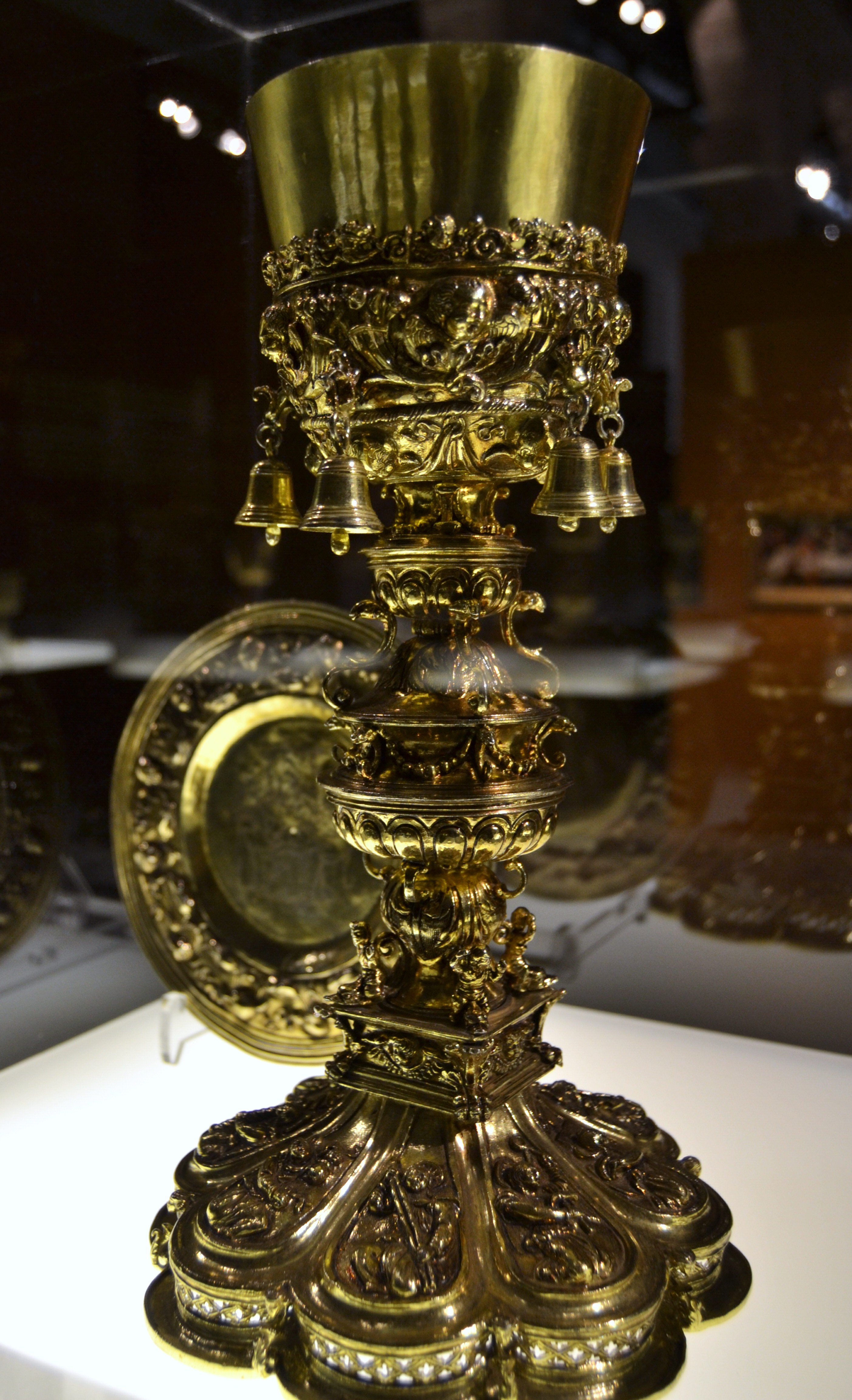 Calze del primer terç del segle XVI, donació del Patriarca Ribera, plata daurada, repussada i cisellada. Església de l'Assumpció d'Andilla